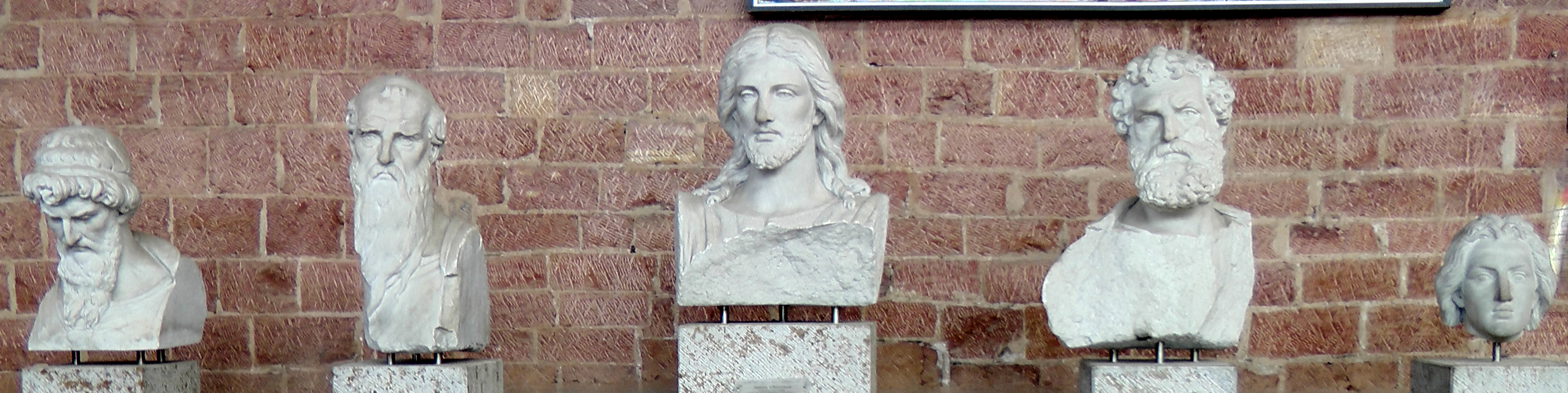 Fragmente der Figur der Apostelfiguren und Jesus von Gustav Kaupert, 2. Hälfte 19. Jahrhundert, Konstantinbasilika Trier